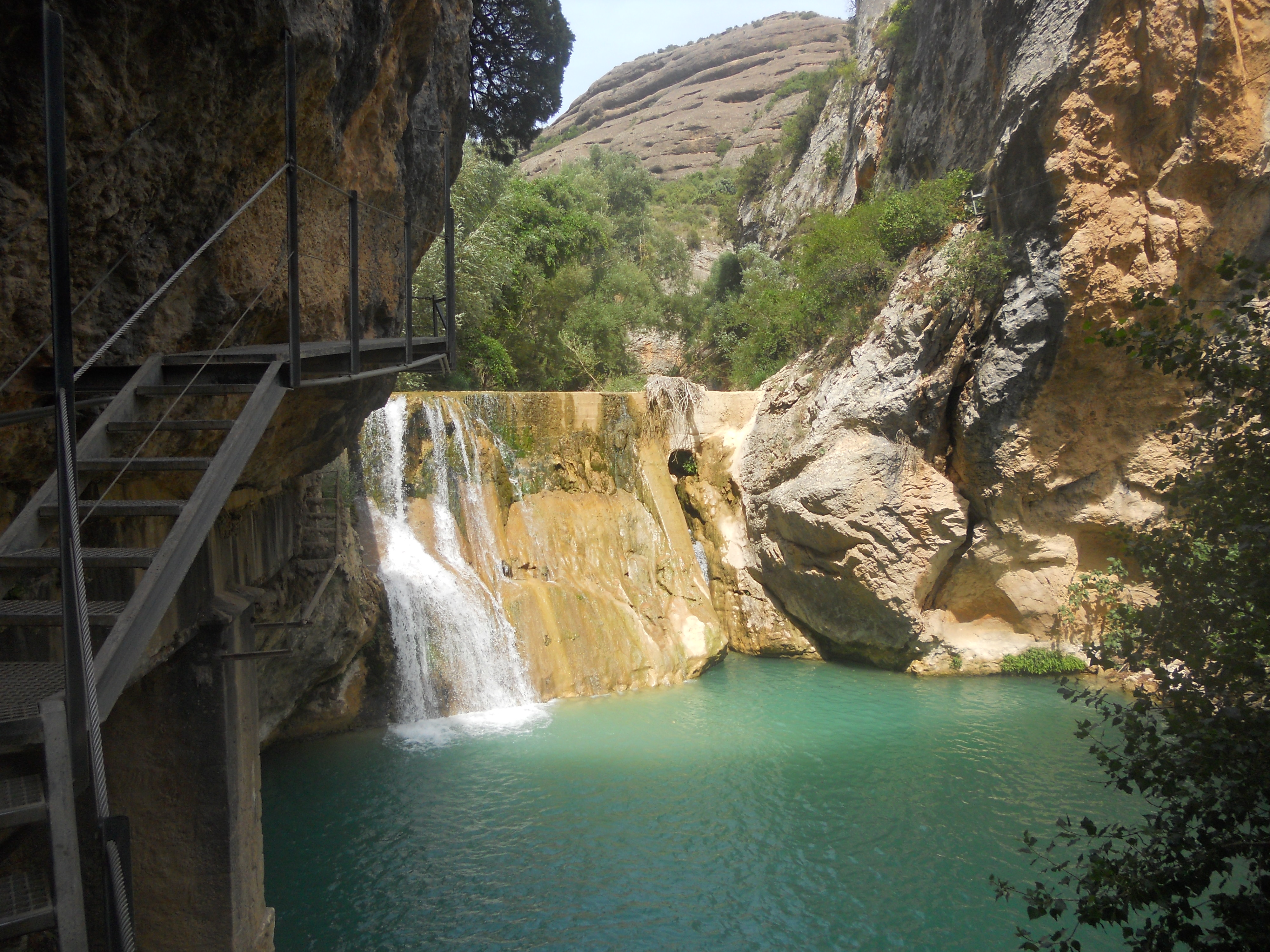 Salto de Agua en las pasarelas del Rio Vero en Alquezar , ( Huesca ) , España.